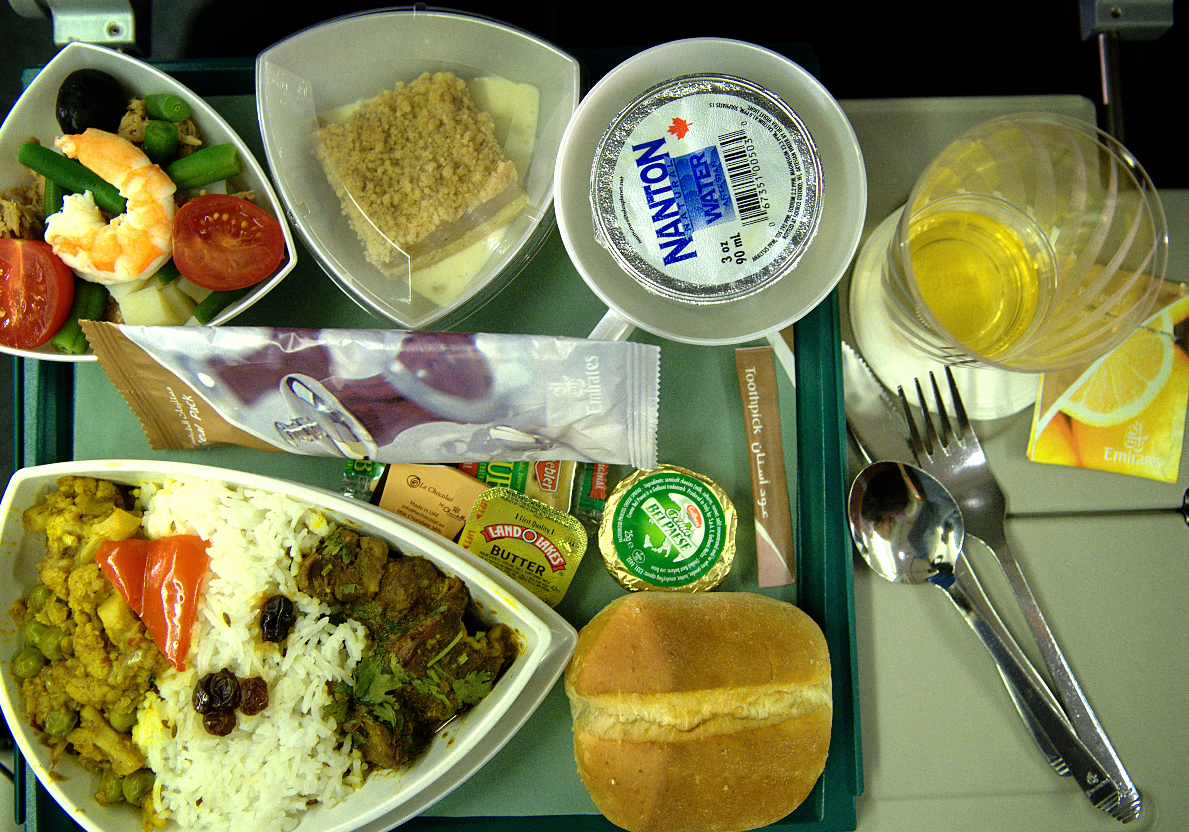 dinner at 36,000 feet up